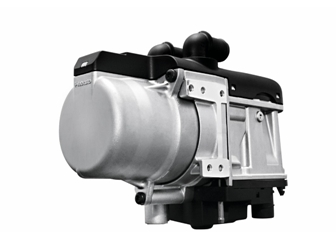 Nezávislé kúrenie Thermo Top Evo